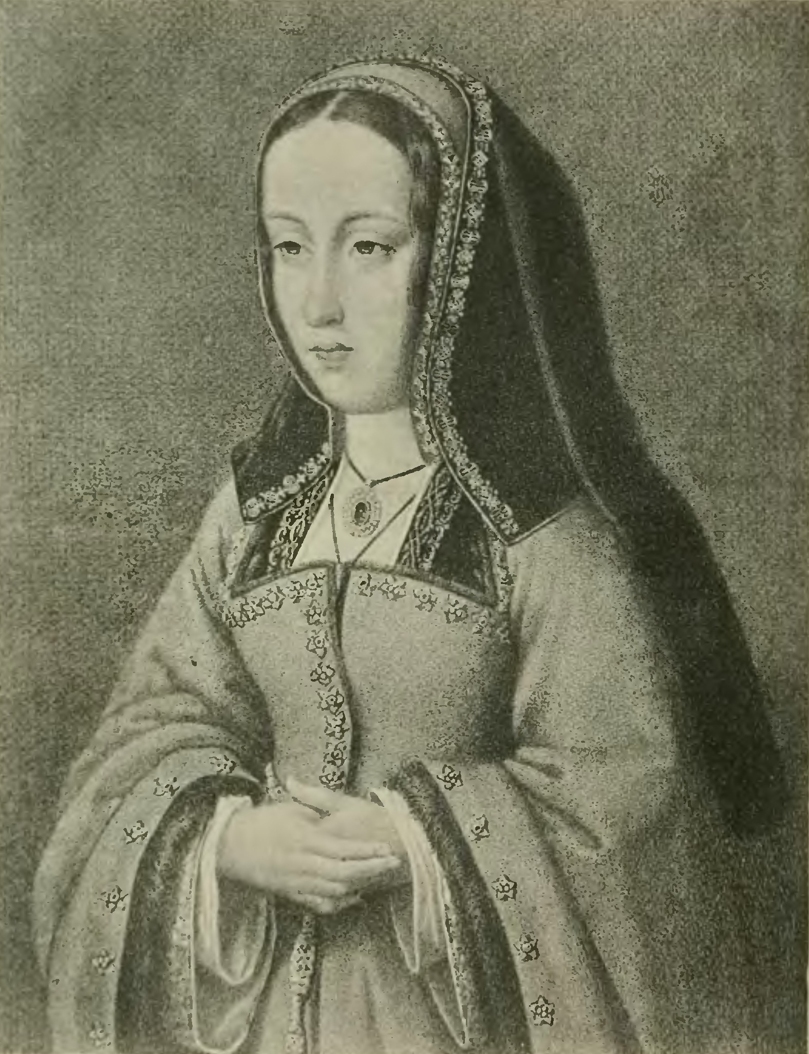 La reina Doña Juana La Loca, estudio historico (1892)